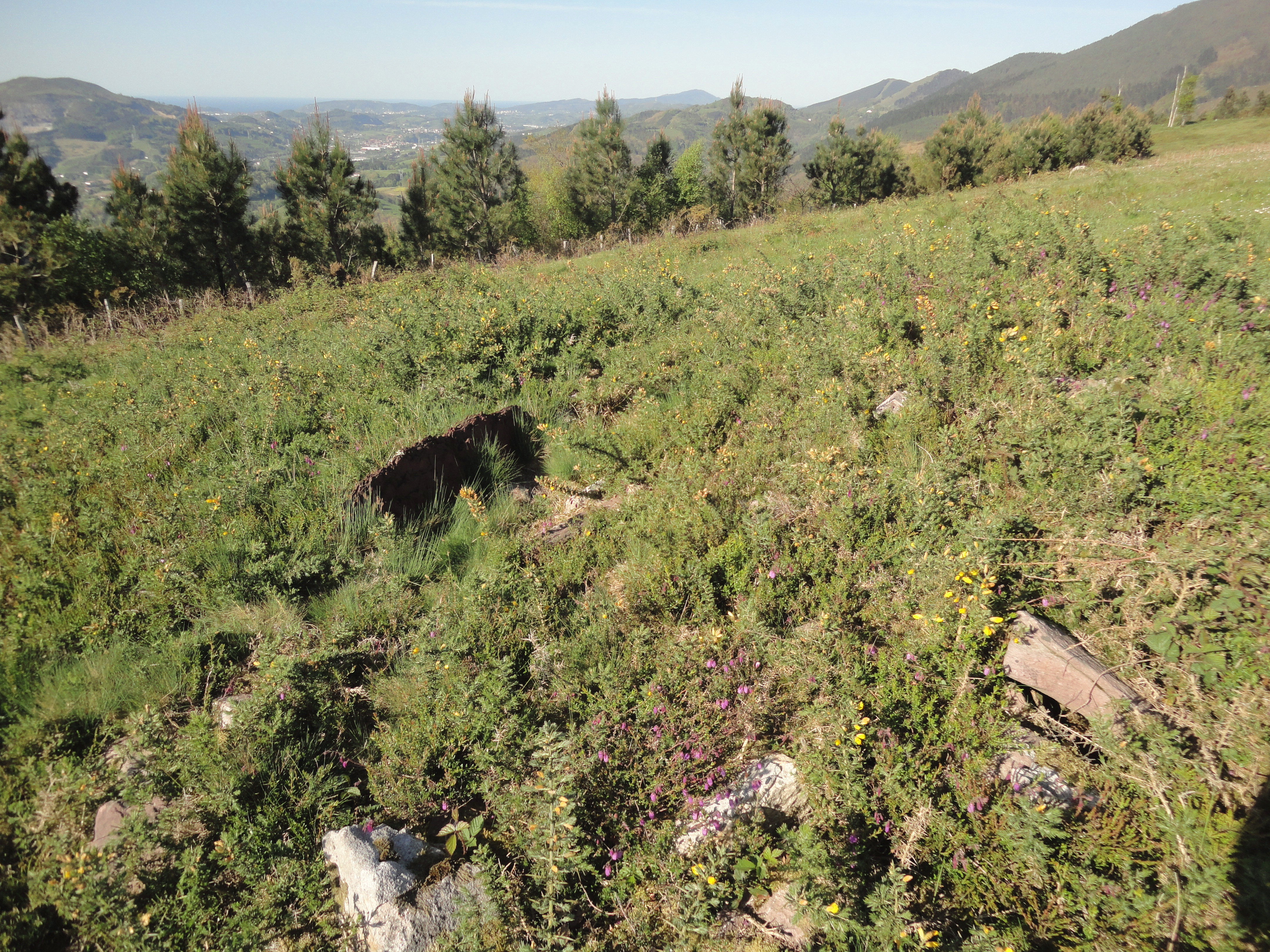 Oindolar II trikuharria